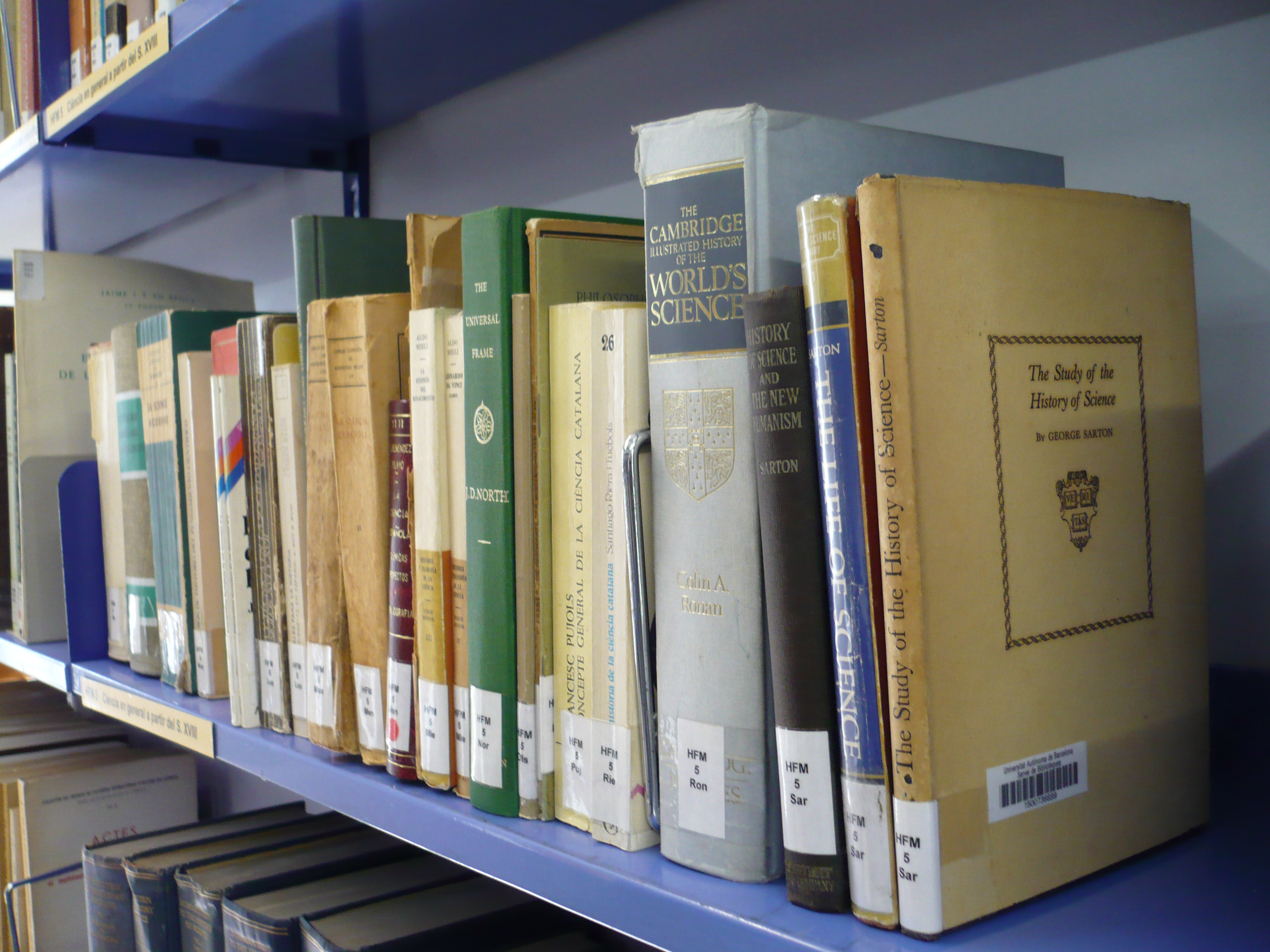 Fons bibliogràfics de Josep Maria Millàs i Vallicrosa dipositat a la Biblioteca de Ciència i Tecnologia de la UAB